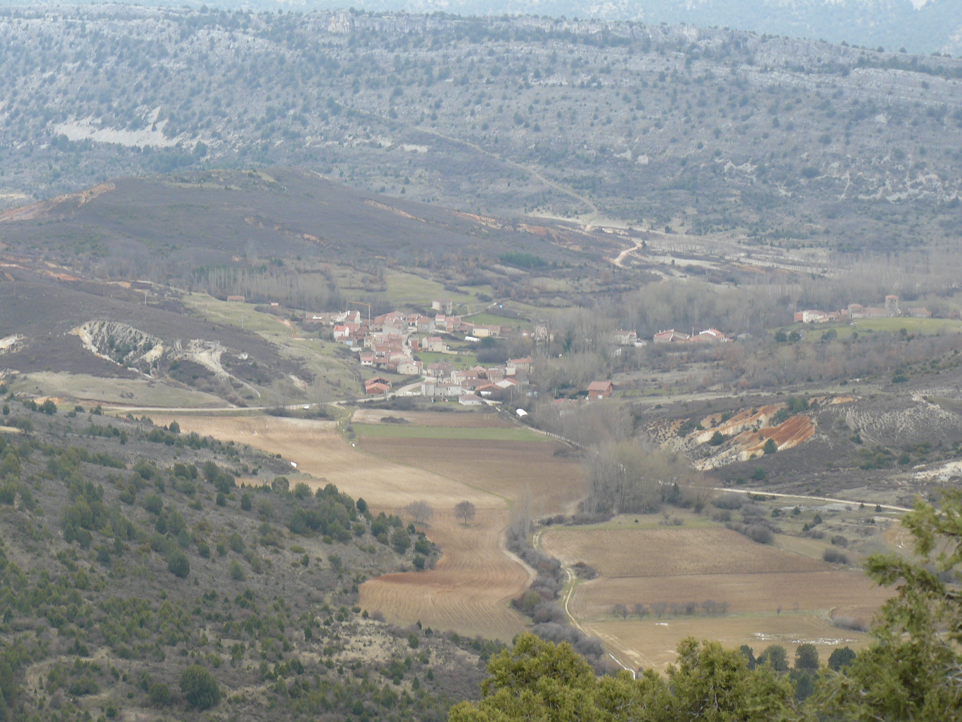 Carazo, Burgos.